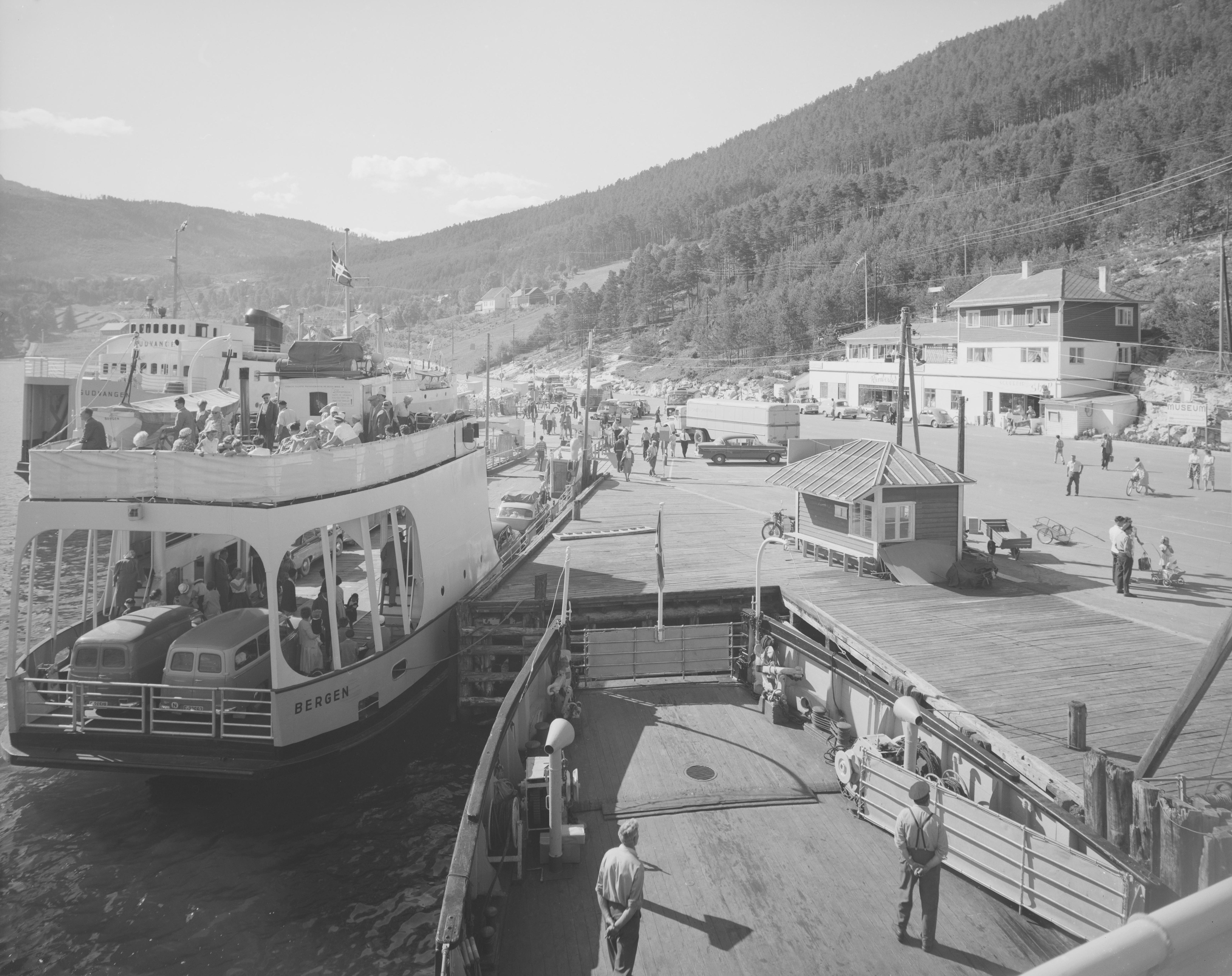 Bildet er hentet fra Nasjonalbibliotekets bildesamling. Fergene er, MF Gudvangen bak til venstre, MF Fjærlandsfjord til venstre mens det trolig er MF Lærdal som man ser fronten på og som bildet er tatt fra. Anmerkninger til bildet var: Fotograf: ÅM Kaupanger, Sogndal, Sogn og Fjordane